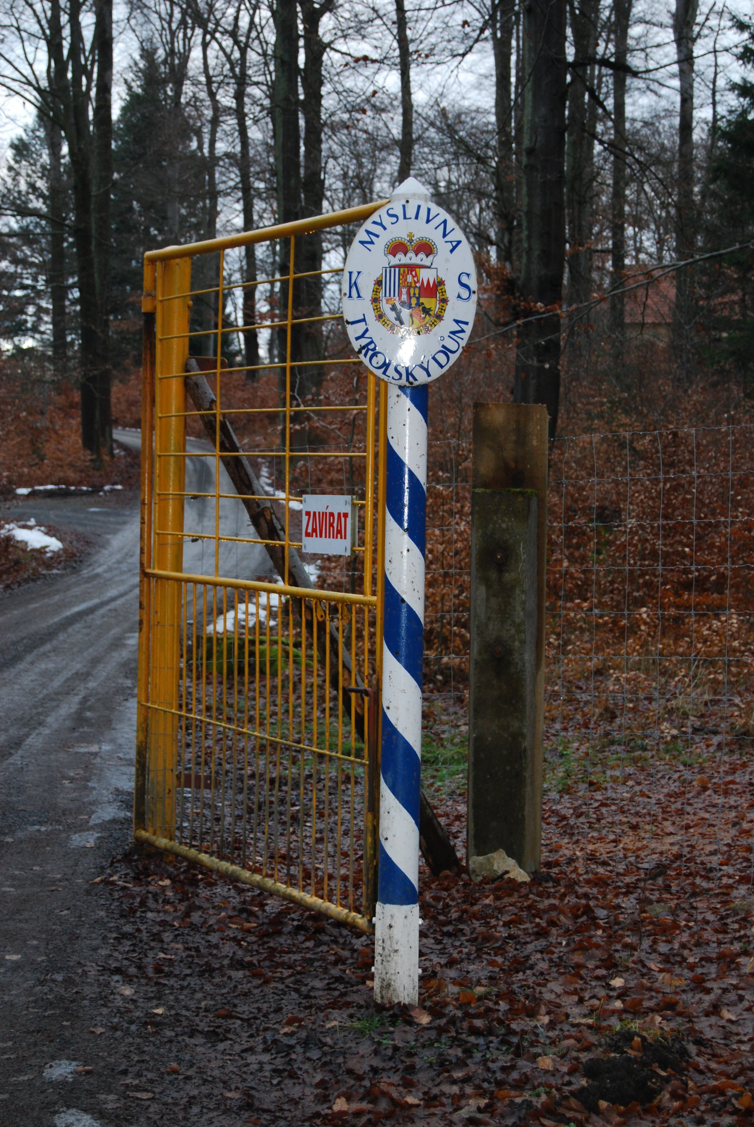 Rukávečská obora, zvaná též Květovská obora. Rukáveč - část města Milevsko v okrese Písek. Česká republika.